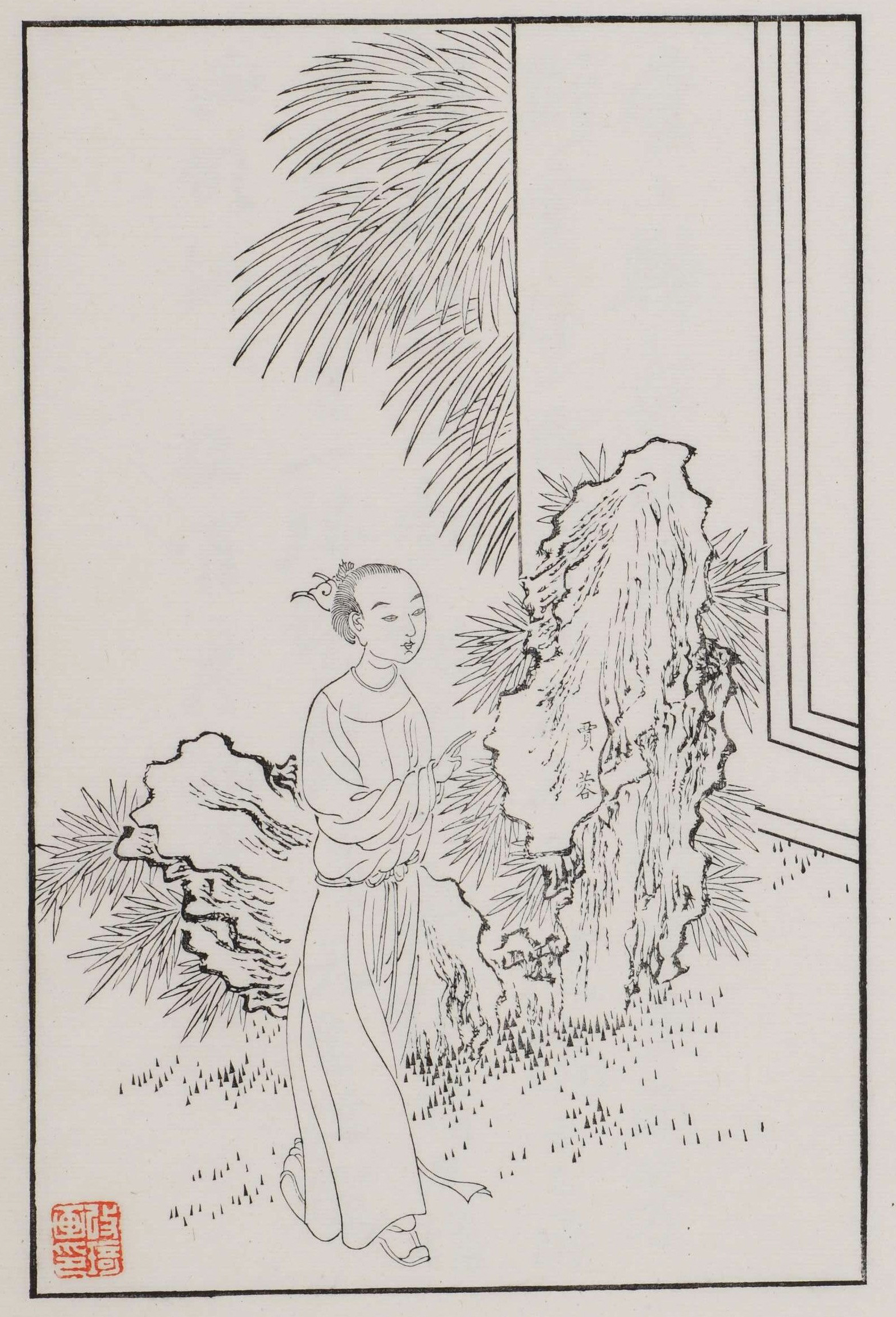 Jia l'Hibiscus